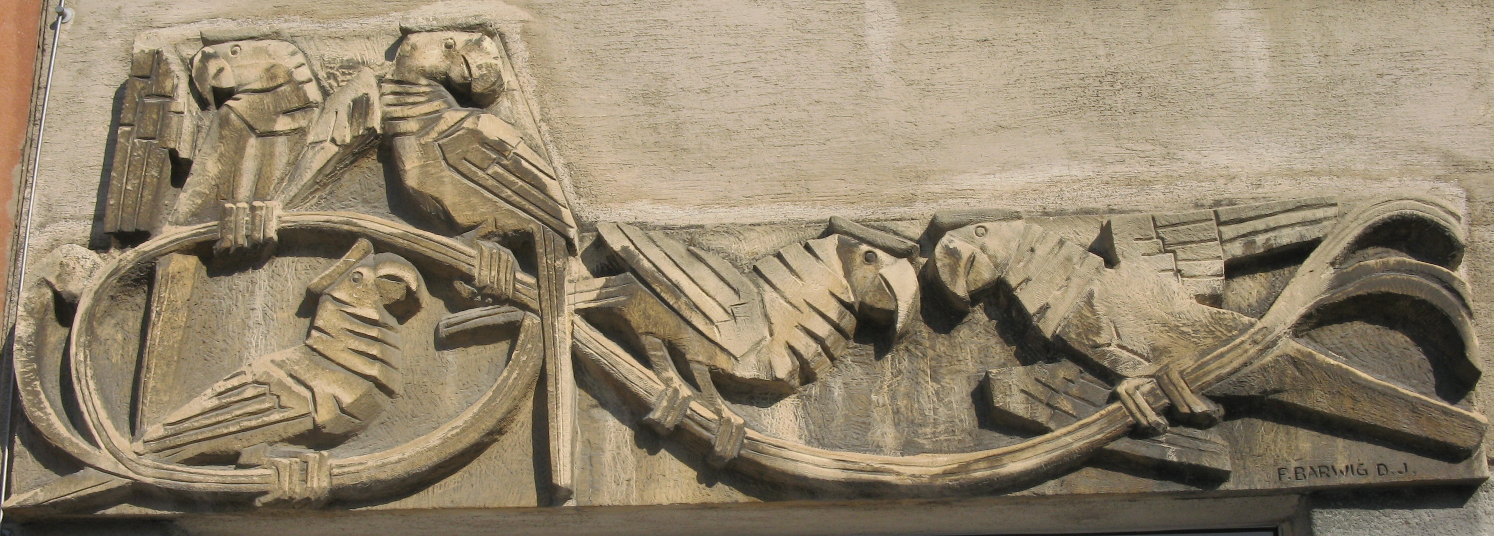 Vogelrelief von Franz Barwig dem Jüngeren in Wien-Meidling, Krichbaumgasse